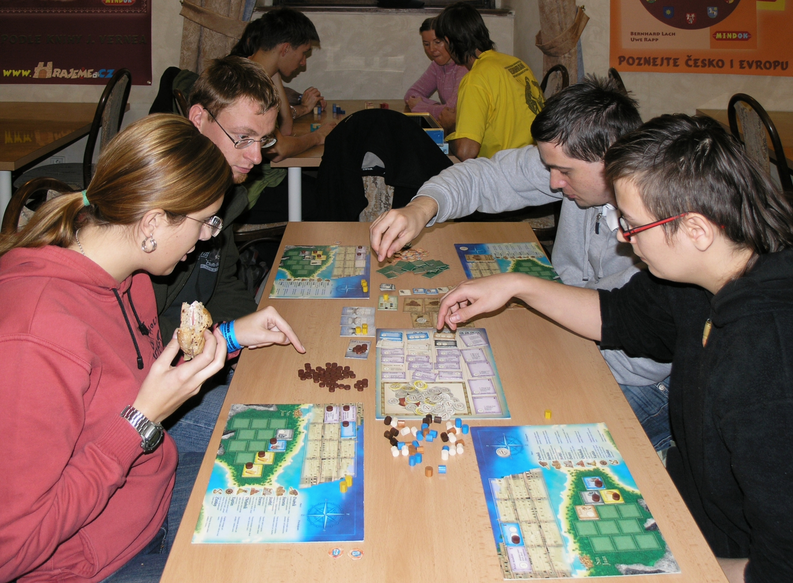 Deskohraní 2008